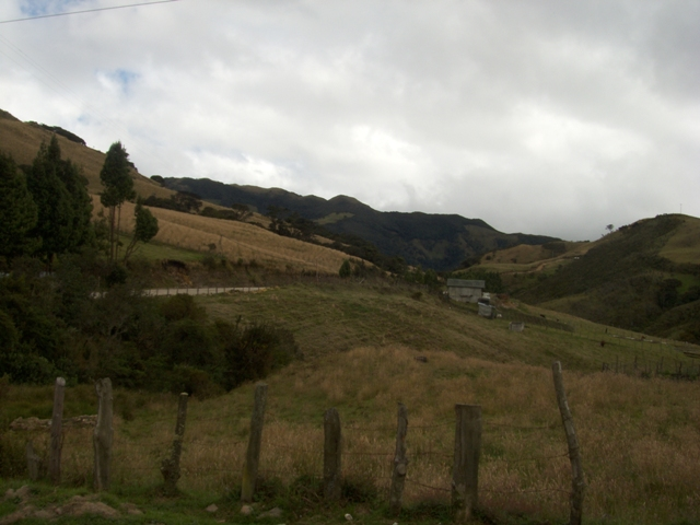 Lo bello del paisaje